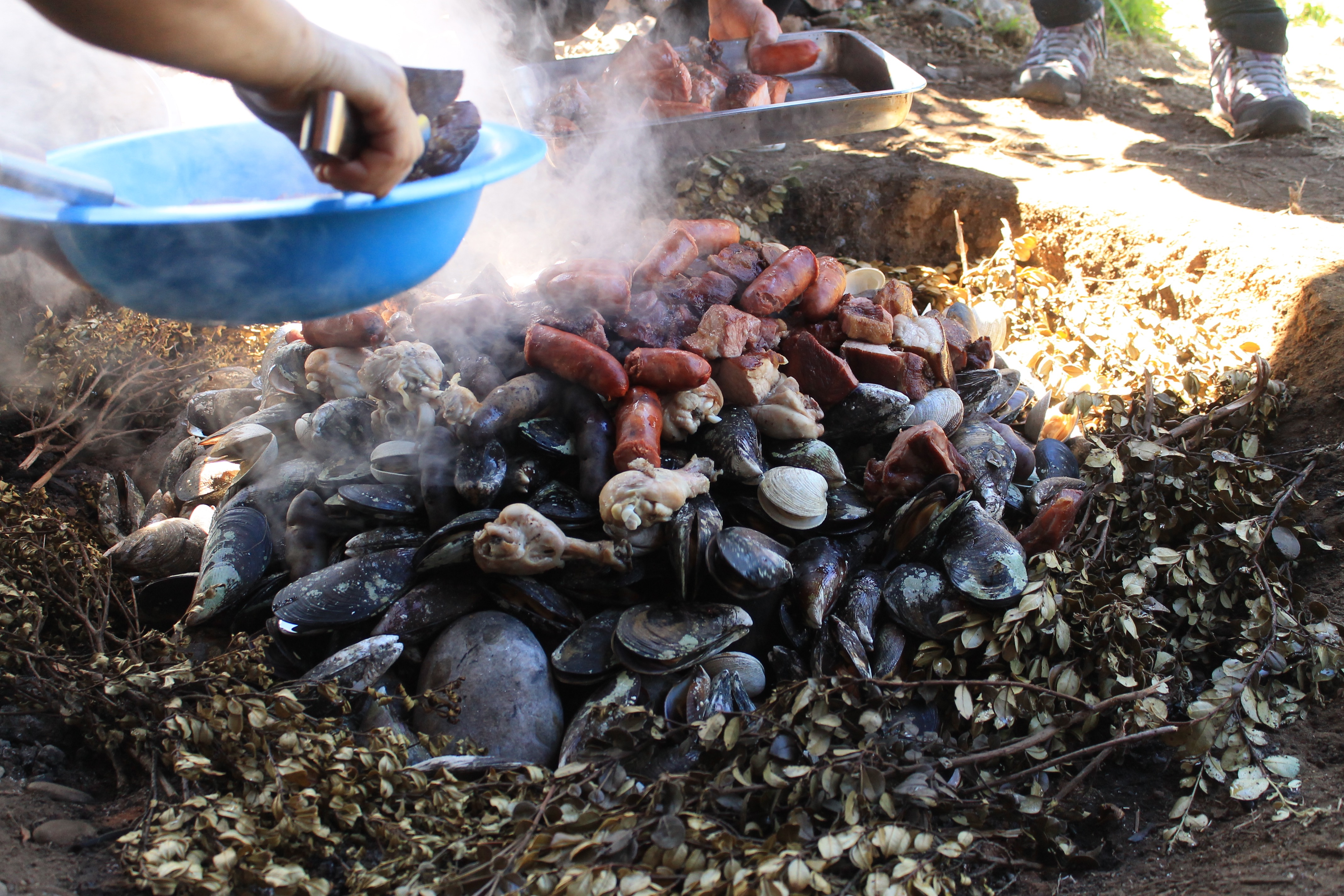 Curanto al hoyo preparado en Chiloé